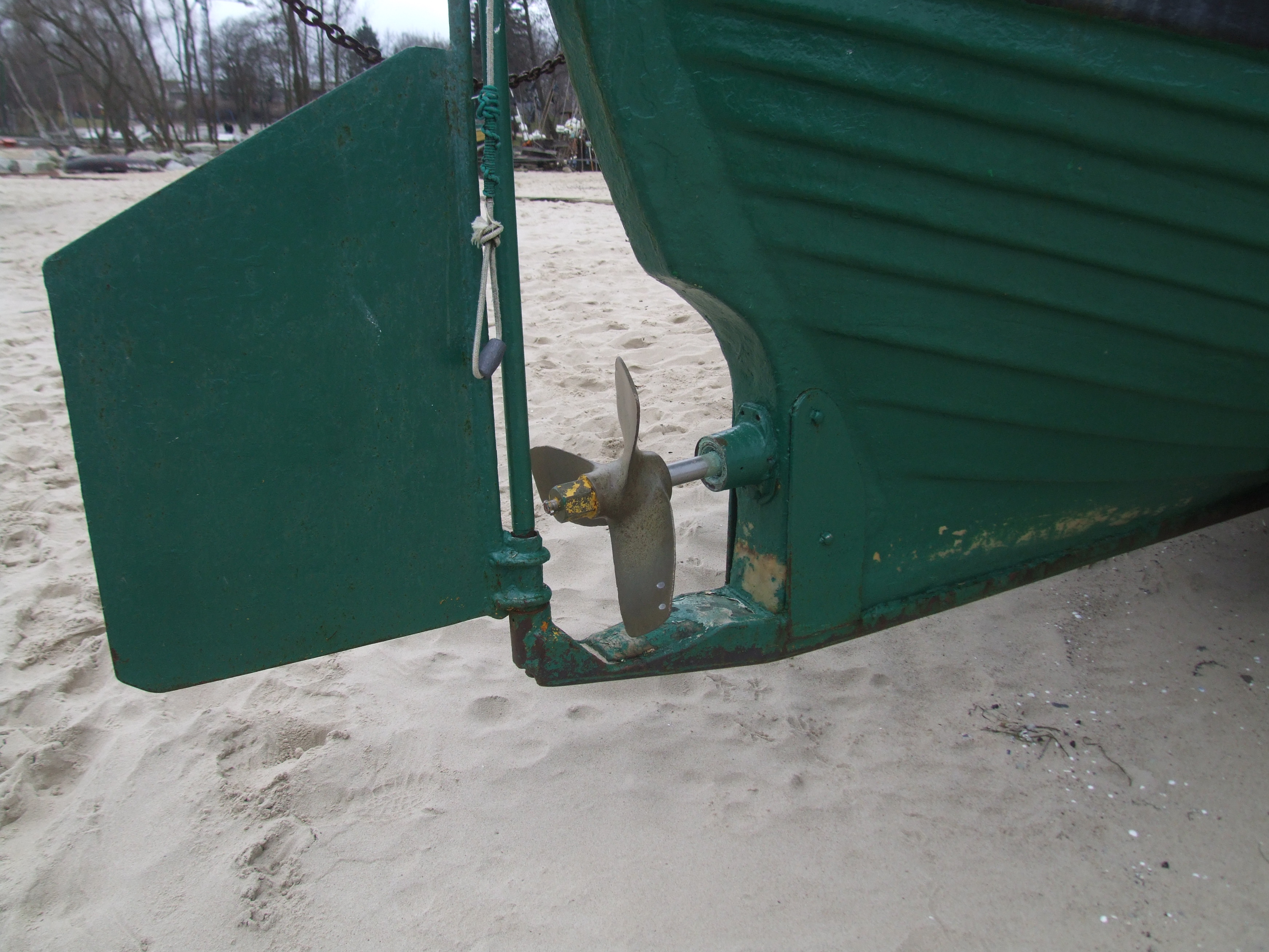 Orłowo - dzielnica Gdyni